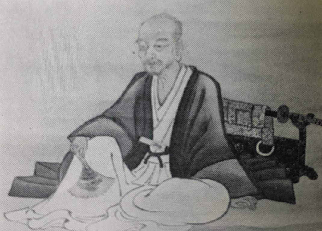 建部寿徳(高光)の肖像(モノクロ)。